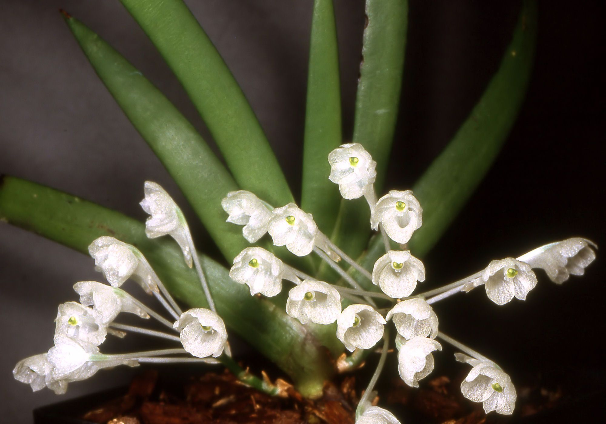 Podangis dactyloceras